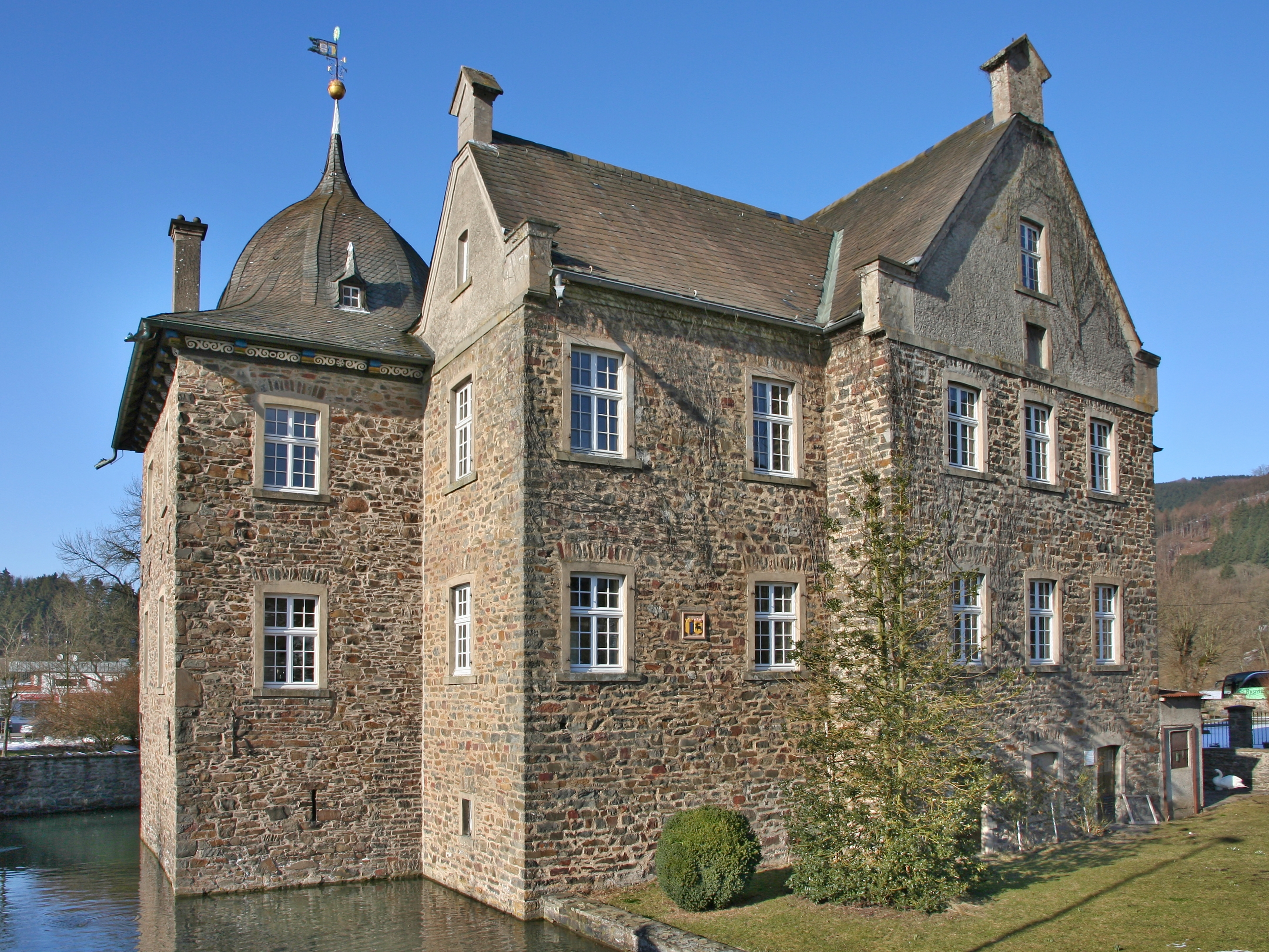 Schloss Lenhausen im Lennetal This is a photograph of an architectural monument.It is on the list of cultural monuments of Finnentrop